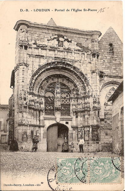 Église Saint Pierre du Martray - Loudun (Vienne). Cette photo est tirée d'une carte postale.